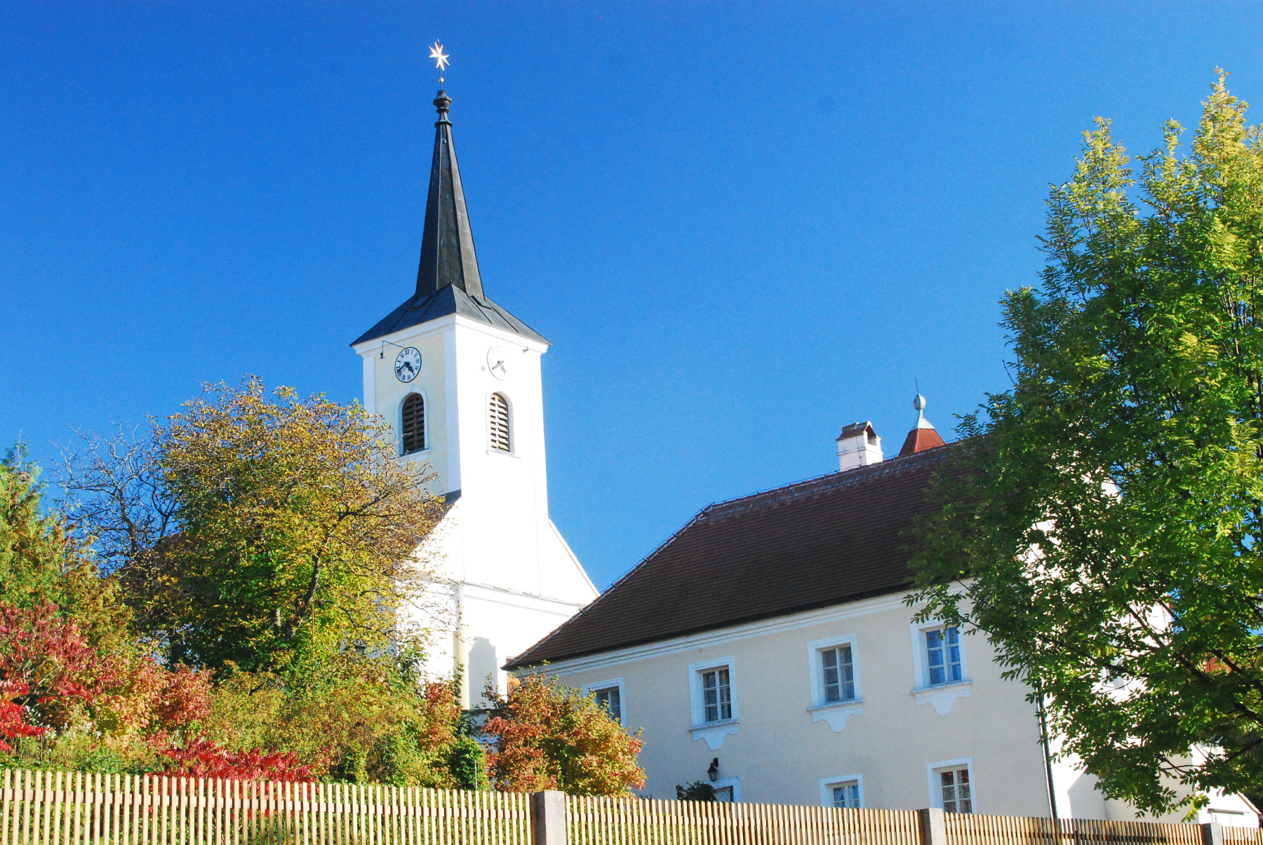 Pfarrhof und Pfarrkirche hl. Margarethe.